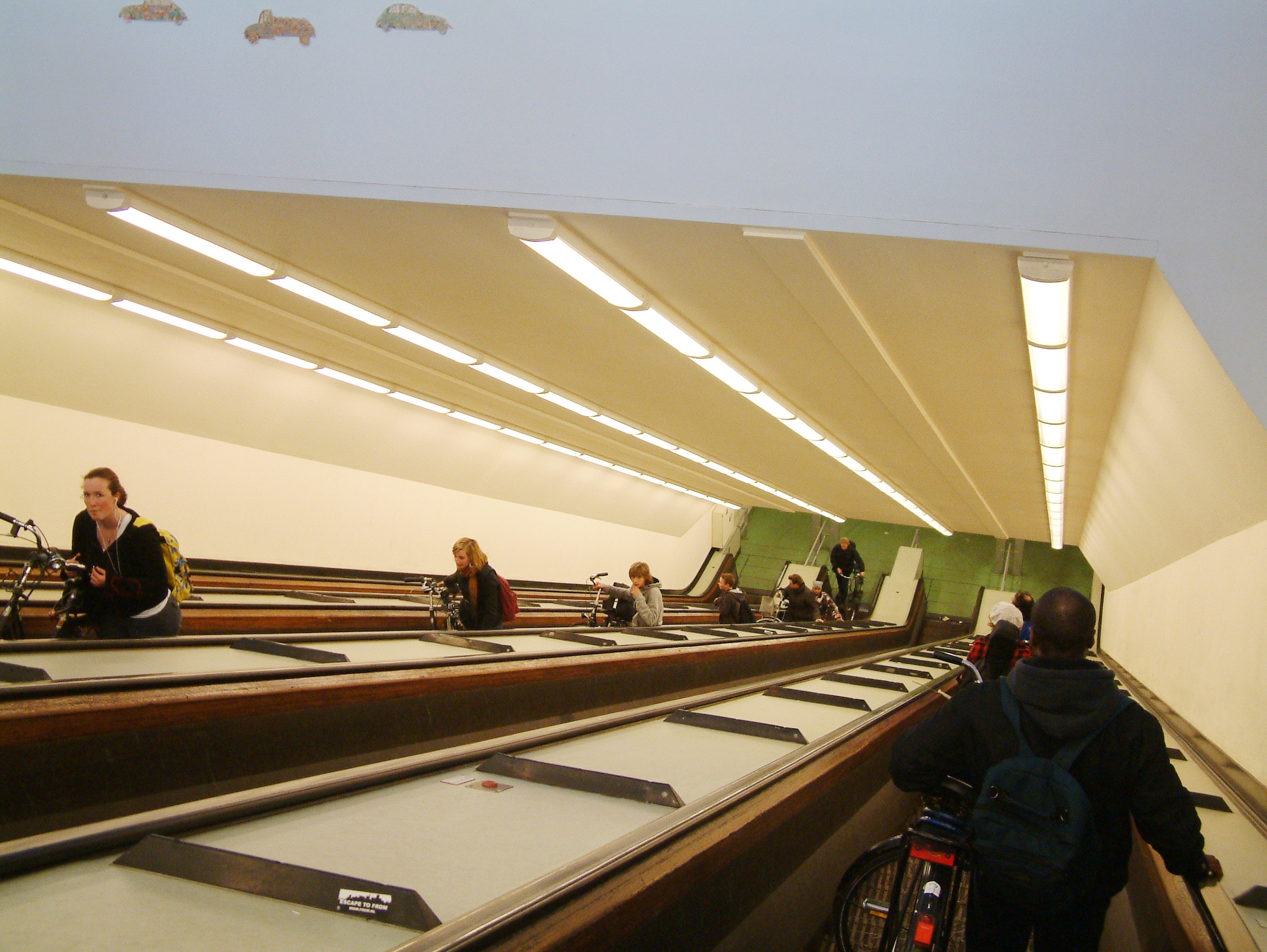 Maastunnel Rotterdam Roltrappen Zuidoever